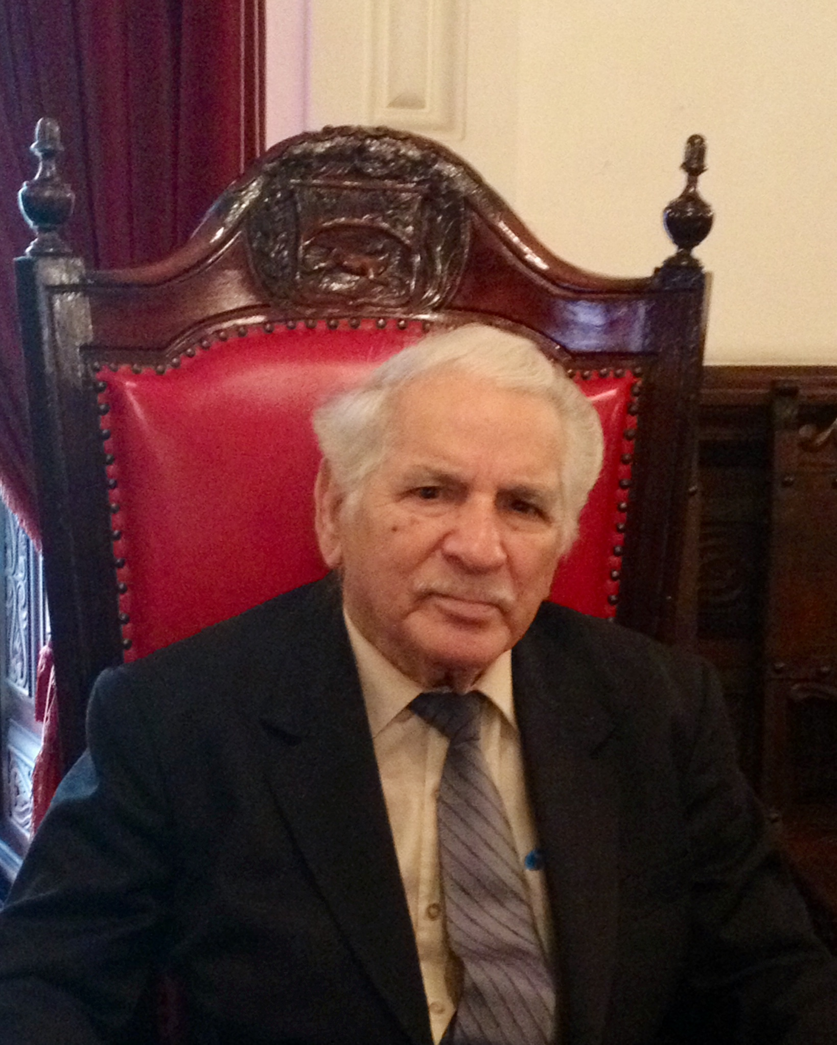 Santos Rodulfo Cortés